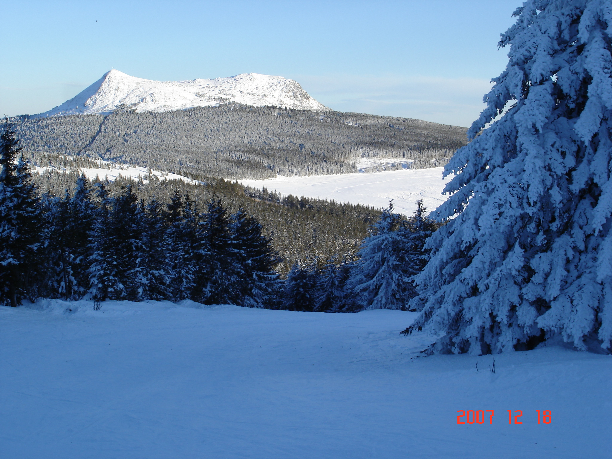 Le Mézenc, 1753 m, vu depuis les pistes des Estables, sur le mont d'Alambre